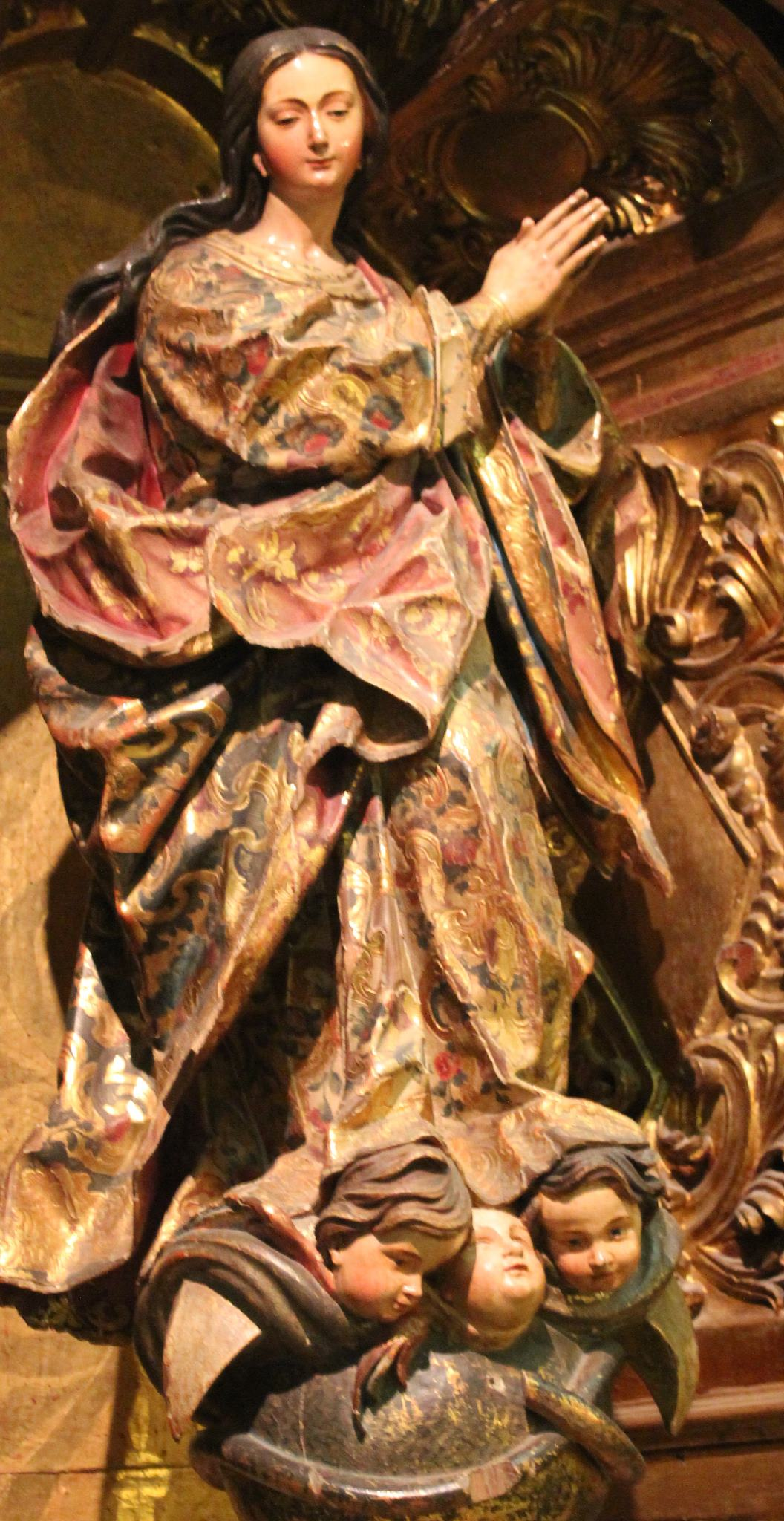 Talla de la Inmaculada Concepción de la Catedral de Mérida.